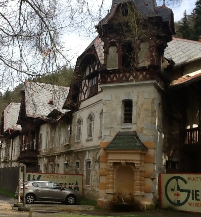 Jindřichův dvůr Lázně Kyselka 2014